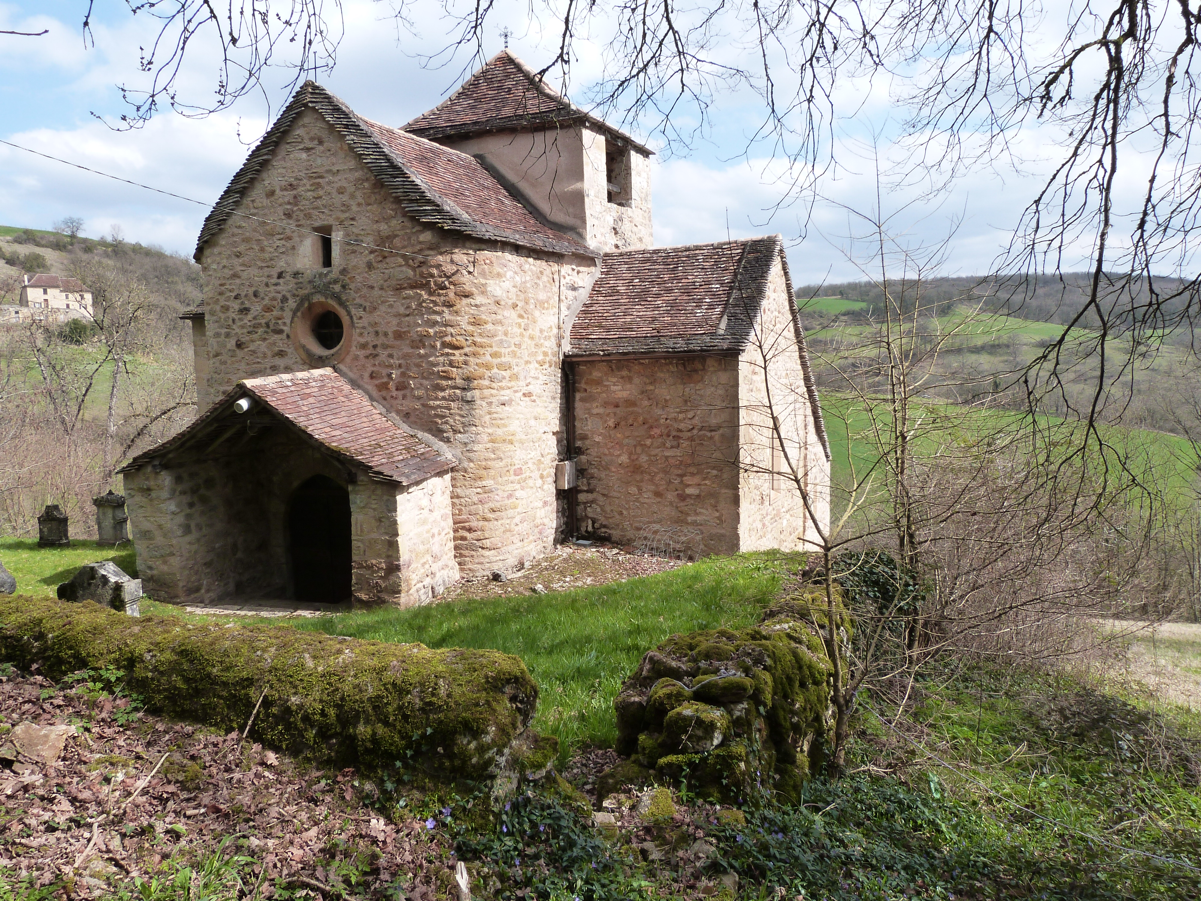 Chapelle Saint-Clair au hameau de Saint-Loup